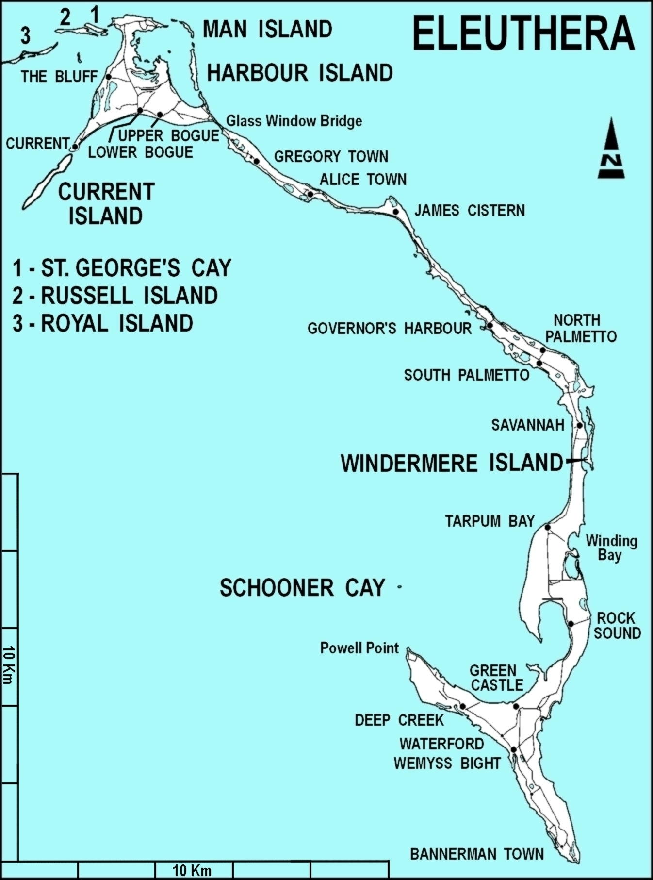 Karte der Insel Eleuthera